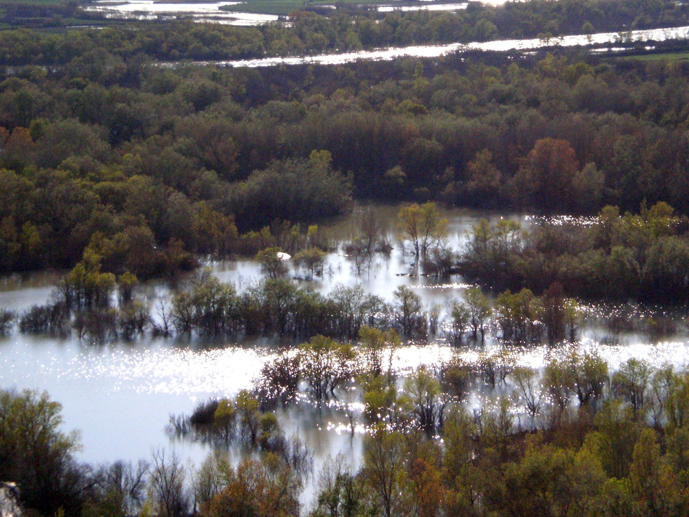 Foto del Galacho de Juslibol (Zaragoza, España).